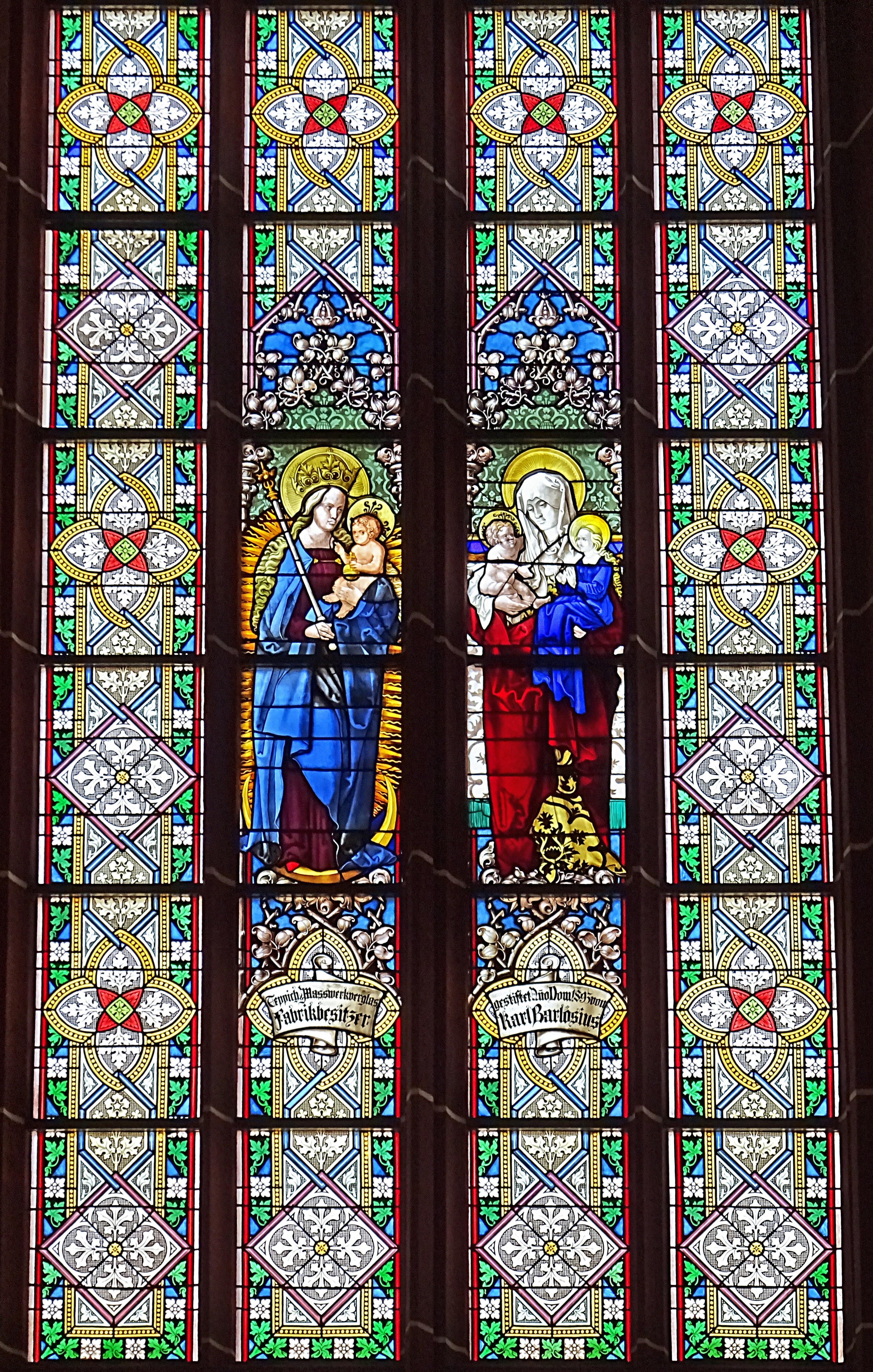 Maria die Himmelskönigin und Anna selbdritt, Buntglasfenster in der Johanneskirche Saalfeld